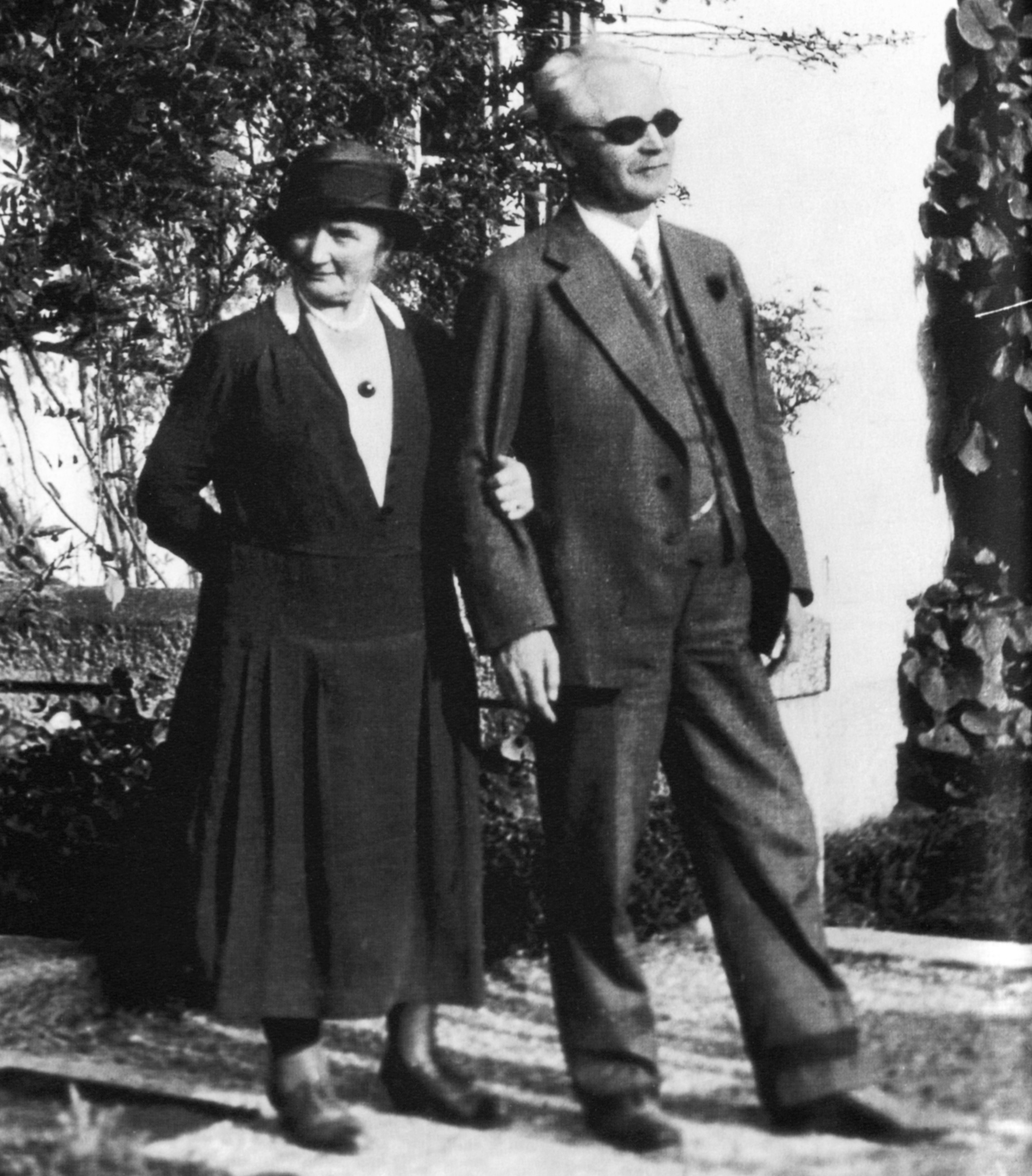 Gustaf Dalén och hustrun Elma utanför Villa Ekbacken på Lidingö